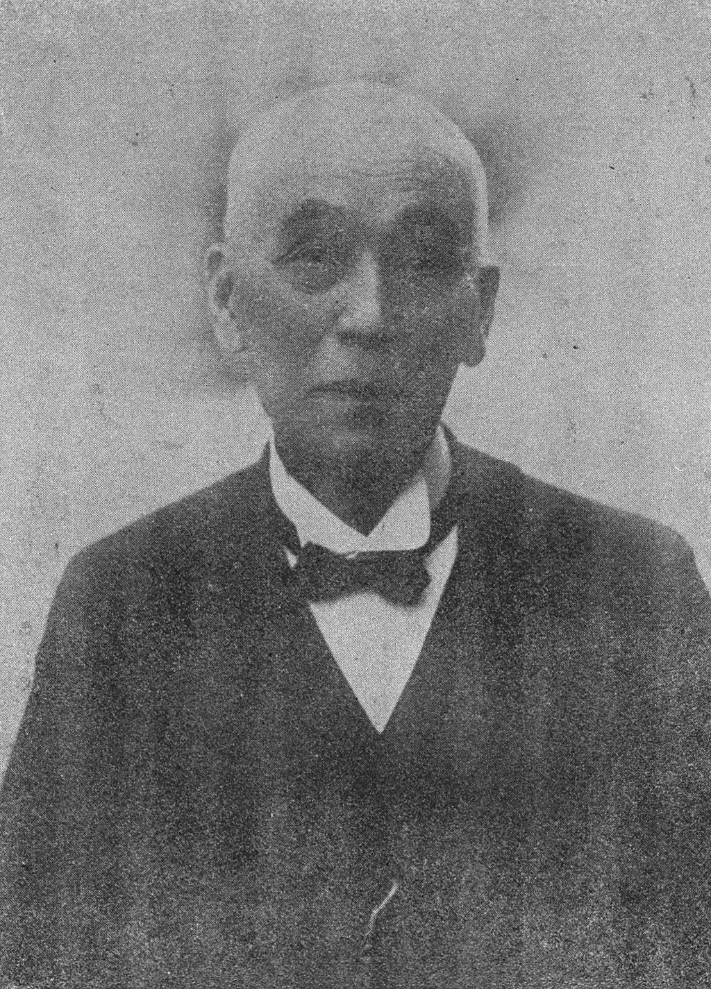 Portrait of Kimura Masakoto (木村正辞, 1827 – 1913)